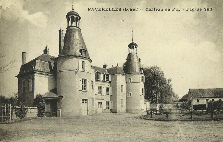 Façade sud du château du Puy, Faverelles, Loiret, Centre-Val de Loire, France